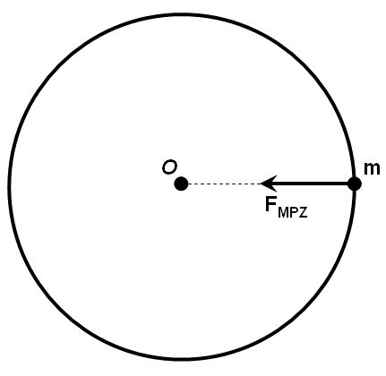 Centripetale kracht: schema.